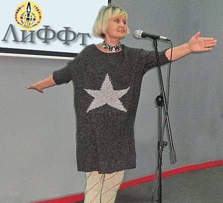 Маргарита Аль. Выступление в ЦДЛ. Поэтический перформанс "ИЩИ"